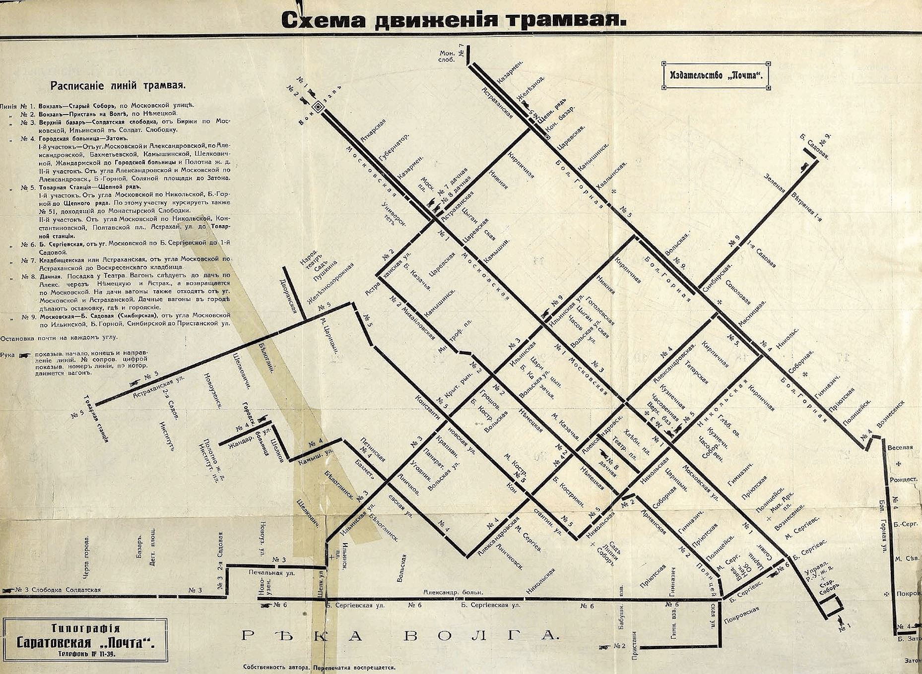 Схема трамвайных линий в Саратове в 1916 году с ещё не построенными перспективными линиями (участок улицы Ильинской от Московской до Горной и линия по Симбирской улице).